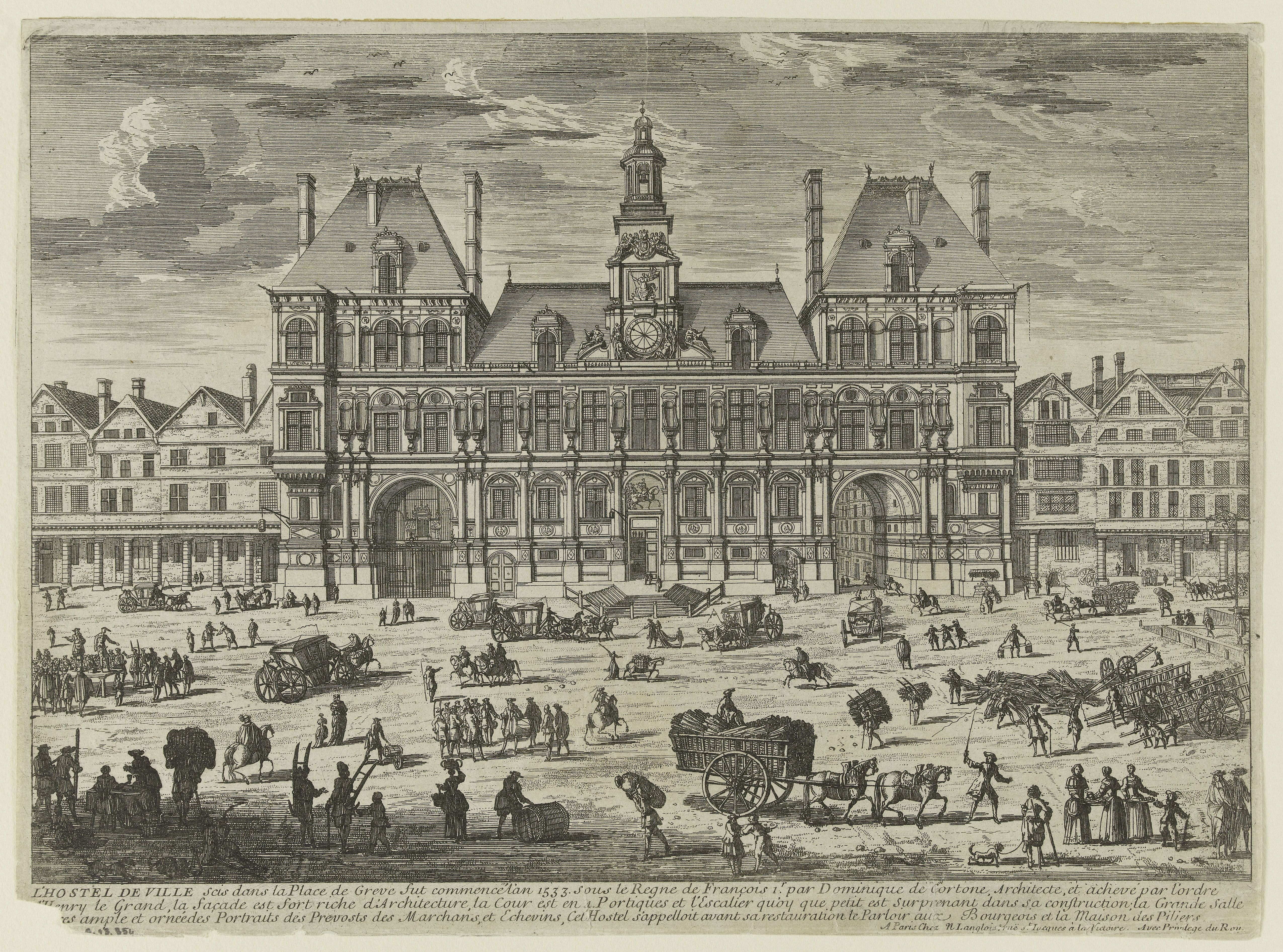 Place de Grève (Paris) vers 1660 - Adam Pérelle (1638-1695) in recueil de vues paris, Langlois, ca 1670.